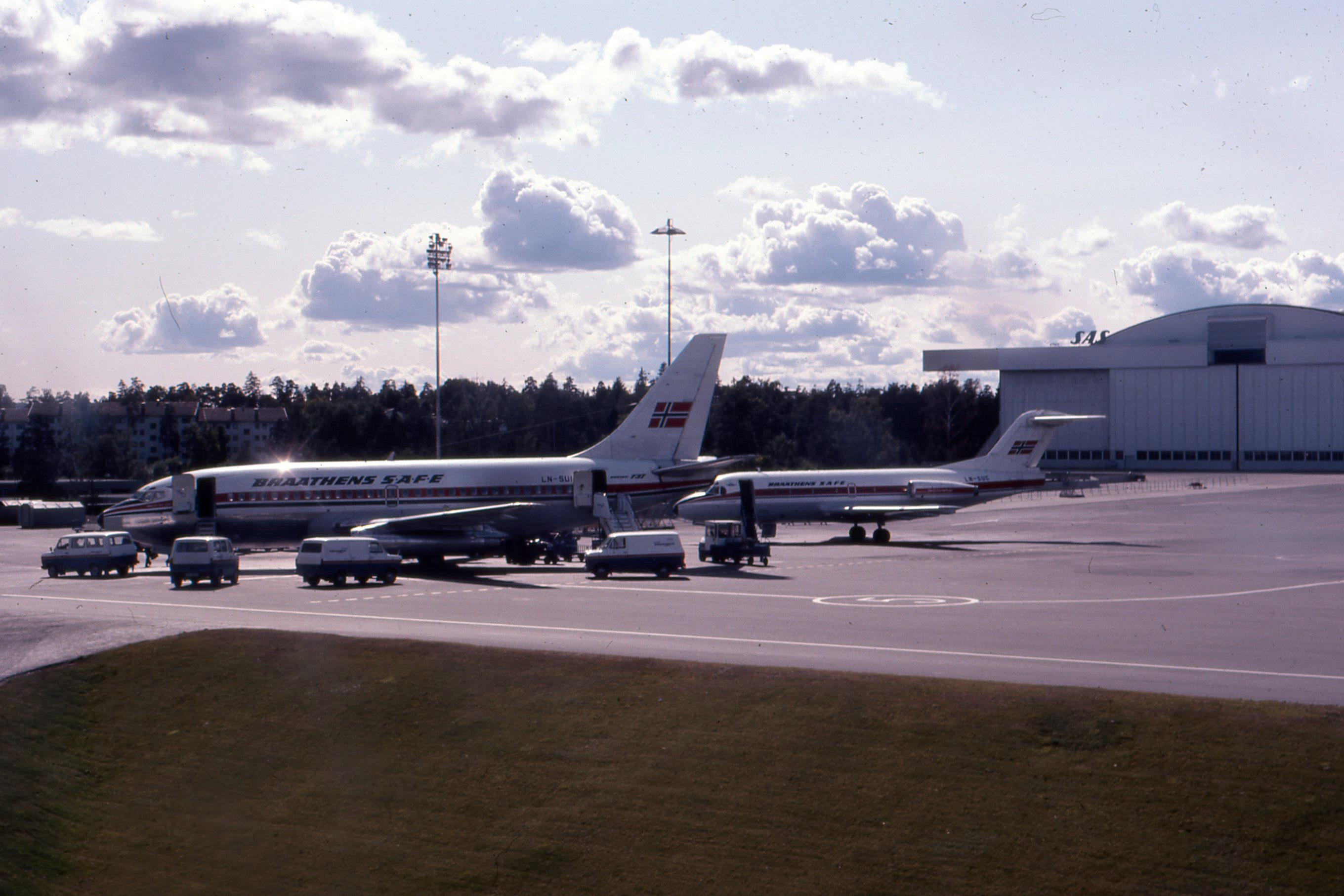 Oslo